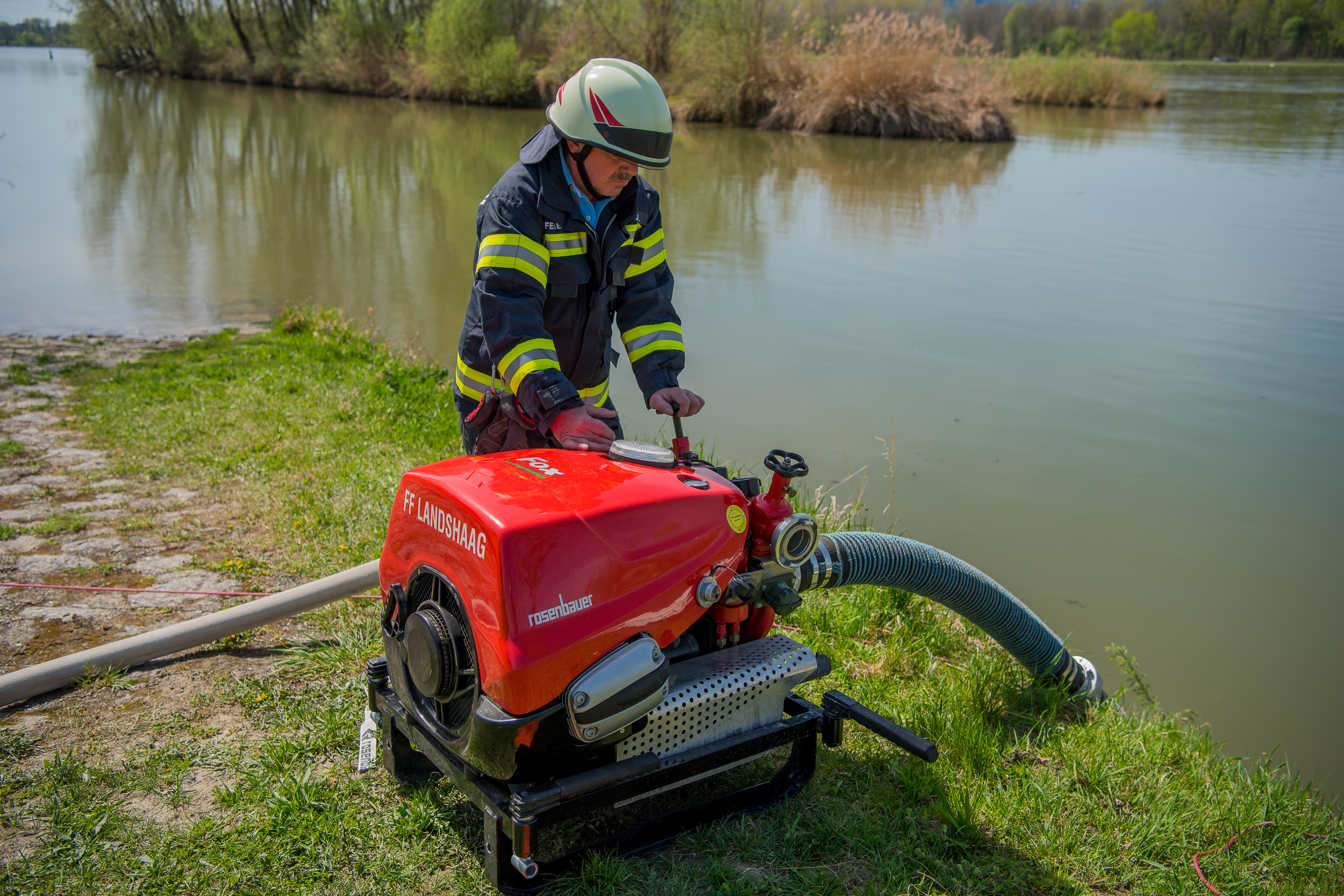 Tragkraftspritze der FF Landshaag saugt bei einem Teich an